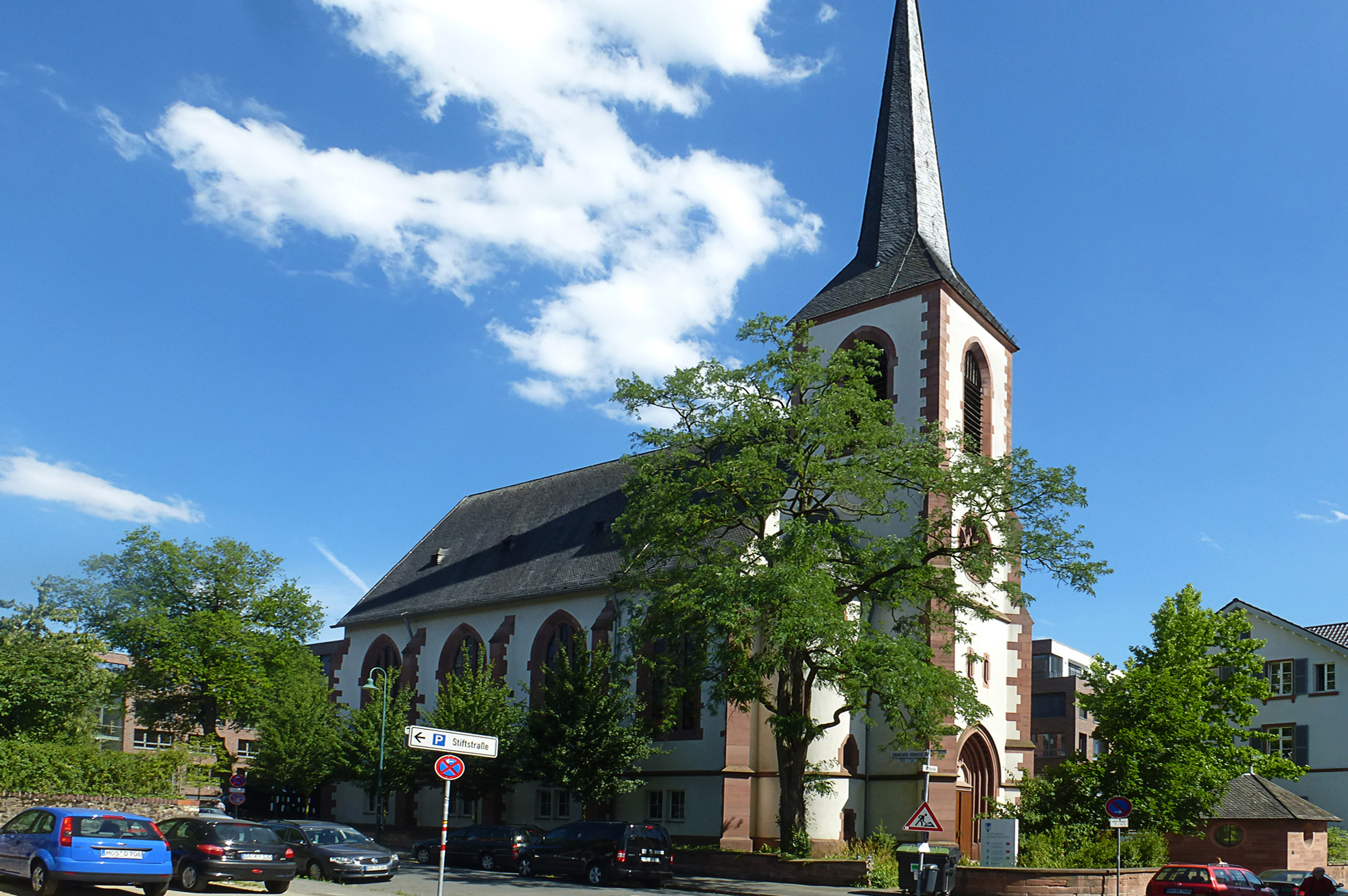 Denkmalgeschütztes Kirchengebäude in Darmstadt, Erbacher Straße 25